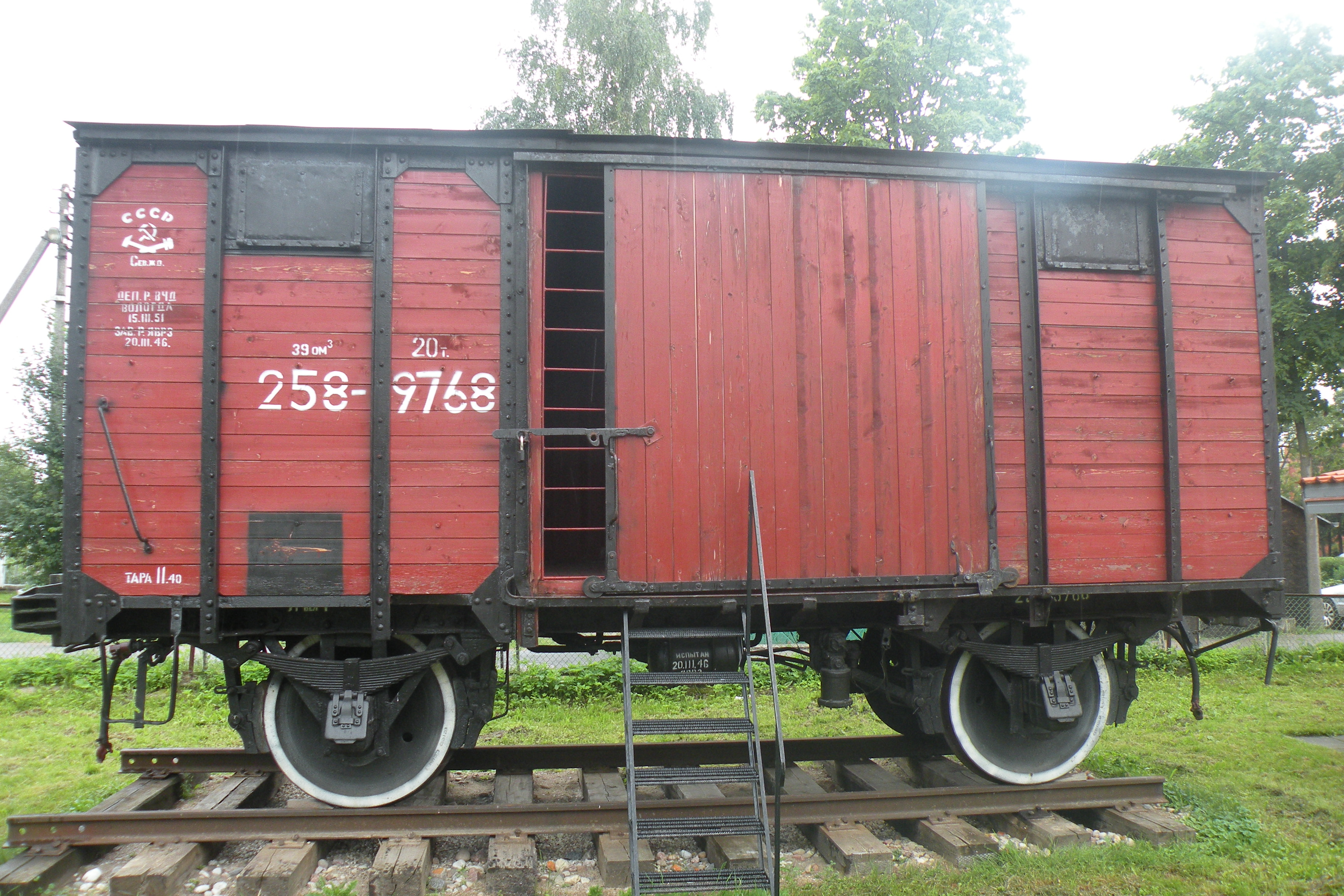 Tremties muziejaus eksponatas - vagonas